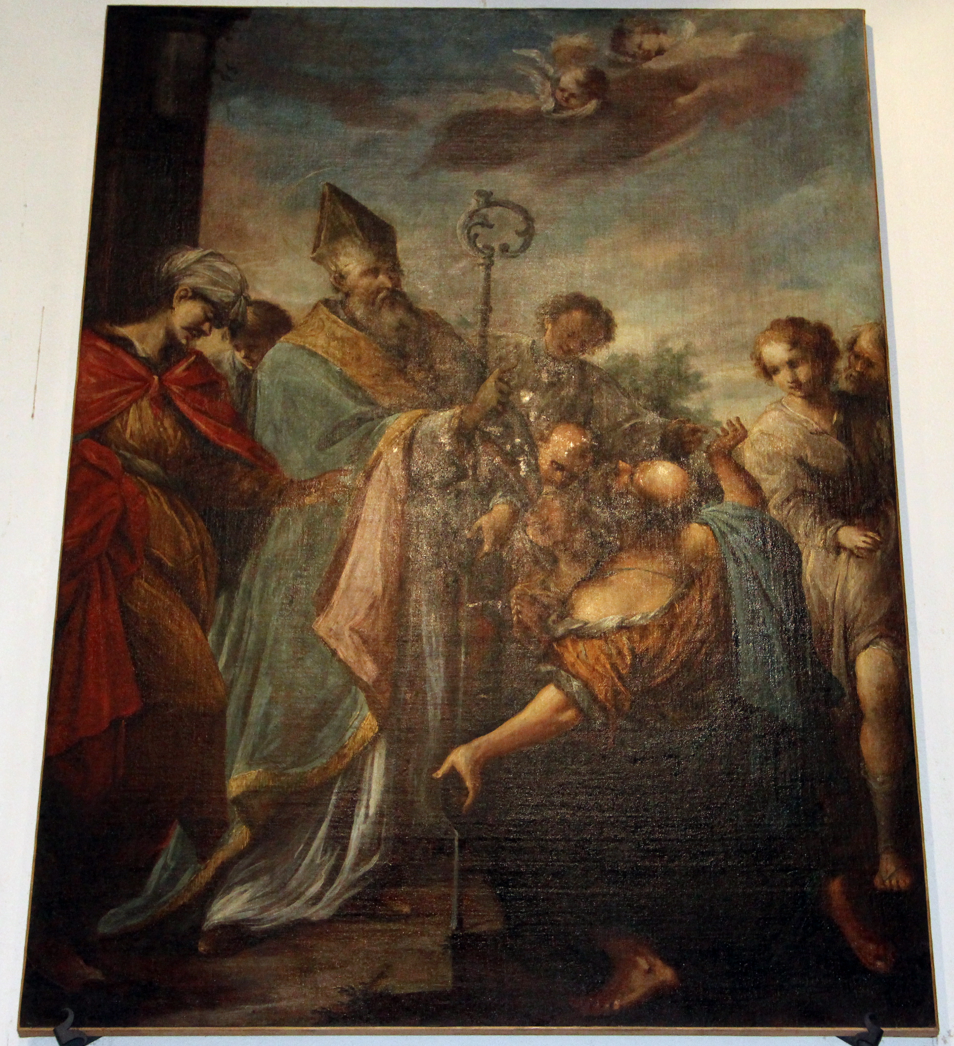 Santa Croce (Vinci)